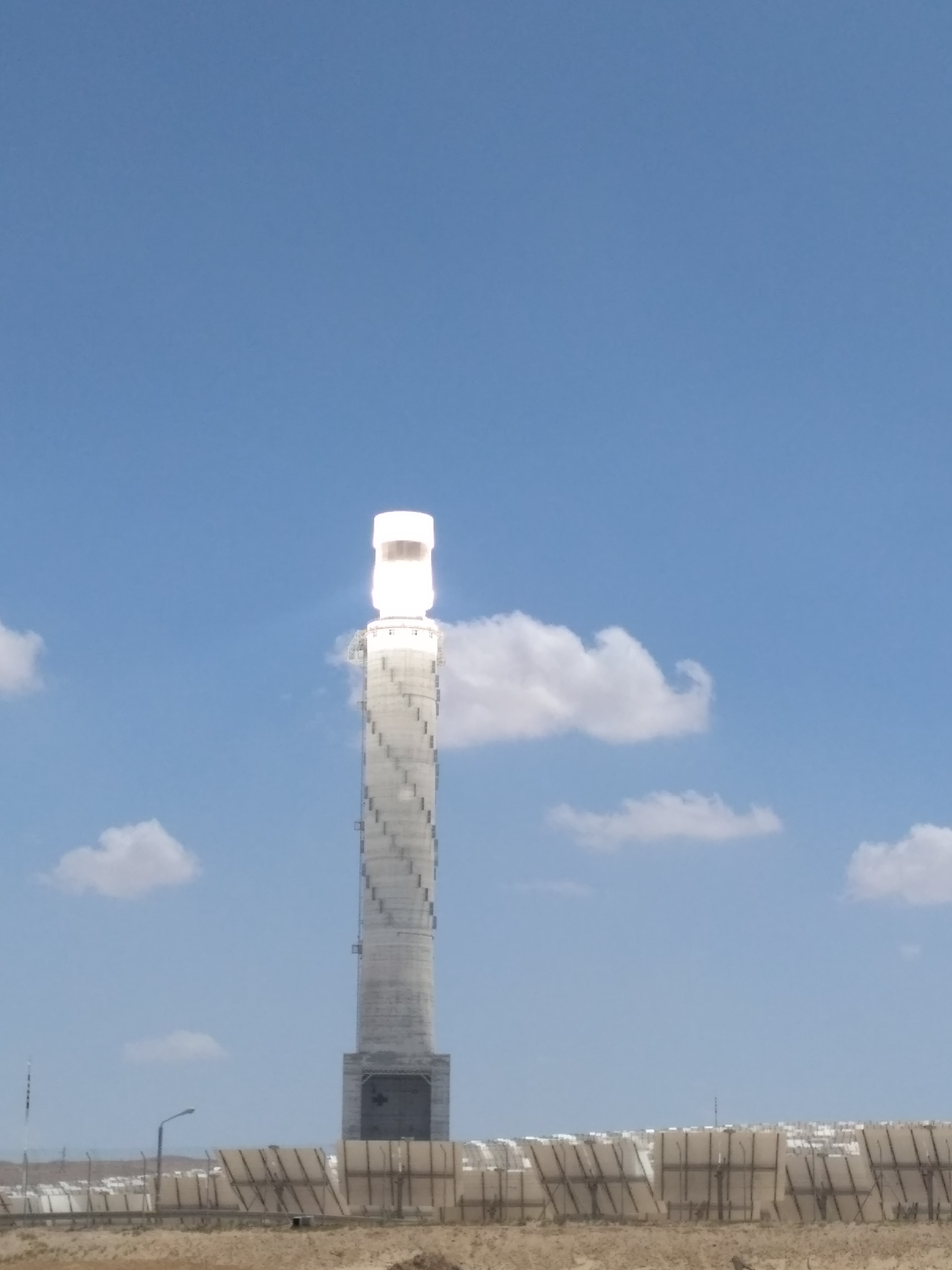 מגדל השמש בתחנת ברייטסורס אשלים בעת פעולה